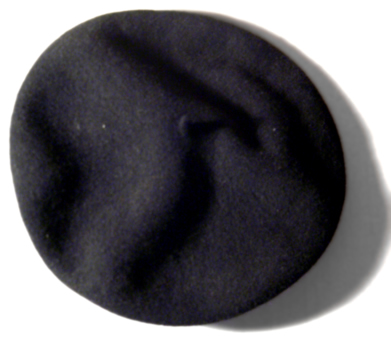 Basker